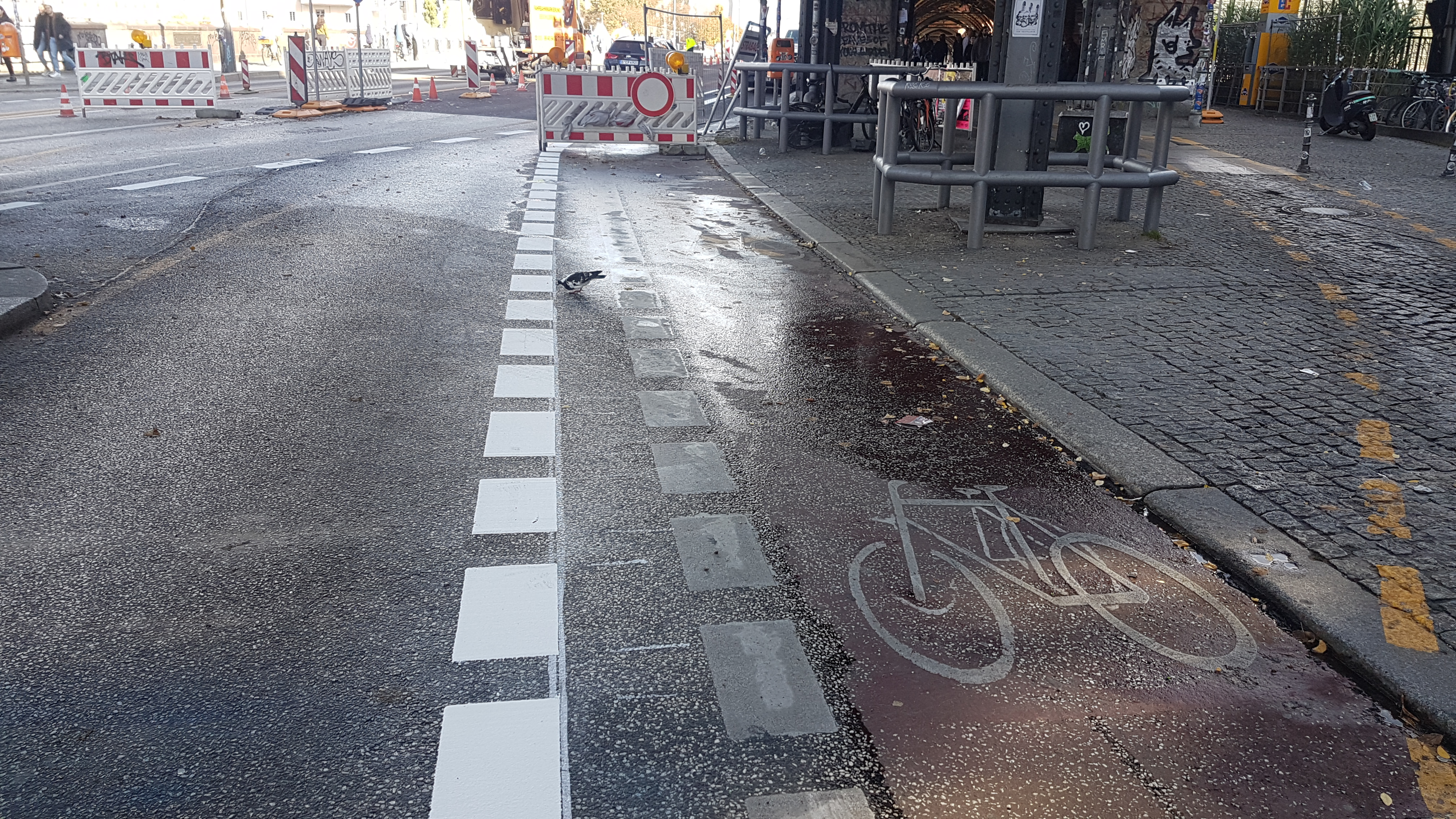 Fahrbahnneuaufteilung Oberbaumbrücke